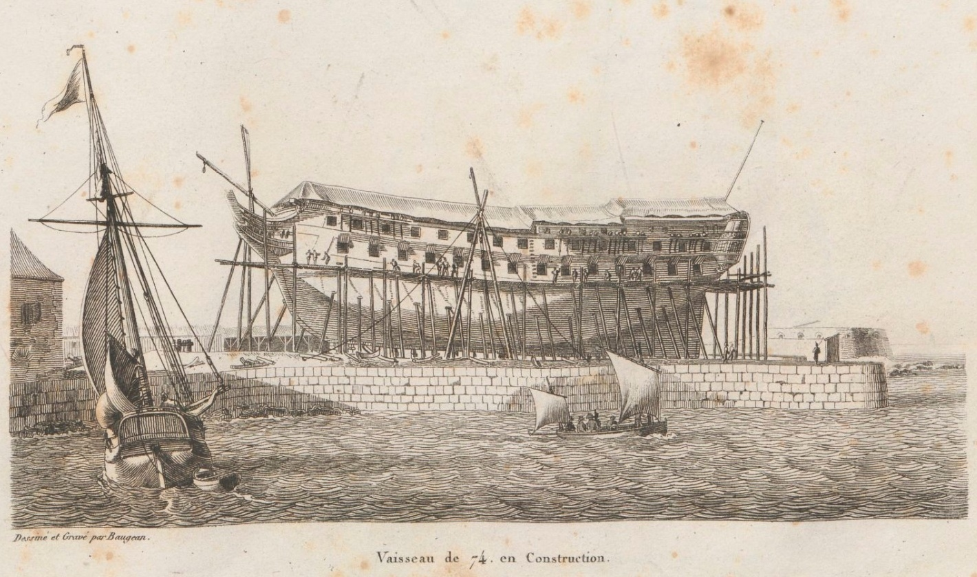 Vaisseau de 74 canons en achèvement dans un port de guerre français sans doute sous le Premier Empire. Gravure publiée en 1826 dans la Collection de toutes les espèces de bâtiments de guerre et de bâtiments marchands qui naviguent sur l'Océan et dans la Méditerranée, dessinée d'après nature et gravée par Baugean, mais réalisée avant 1819 (date de la mort de l'auteur).